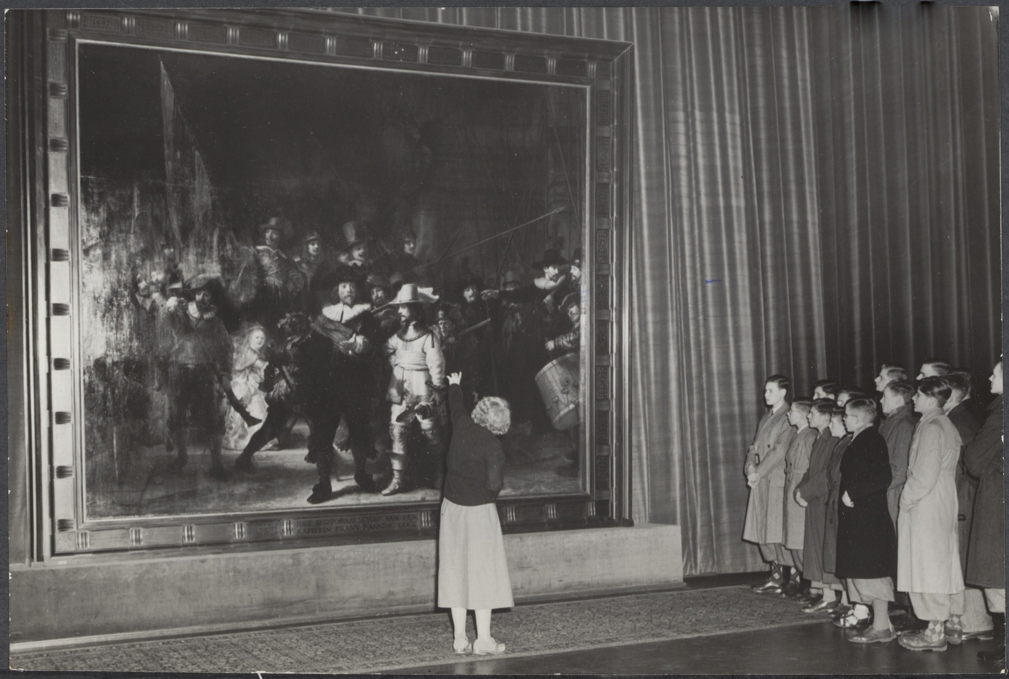 Collectie / Archief : Fotocollectie Elsevier Reportage / Serie : [ onbekend ] Beschrijving : Bezoek schoolkinderen aan musea. Bezoek aan de Nachtwacht in het Rijksmuseum met toelichting door een deskundige Datum : 5 januari 1952 Locatie : Amsterdam, Noord-Holland Trefwoorden : leerlingen, musea, schilderijen Fotograaf : Duinen, […] van / Anefo Auteursrechthebbende : Nationaal Archief Materiaalsoort : Foto (zwart/wit) Nummer archiefinventaris : bekijk toegang 2.24.05.02 Bestanddeelnummer : 050-1054